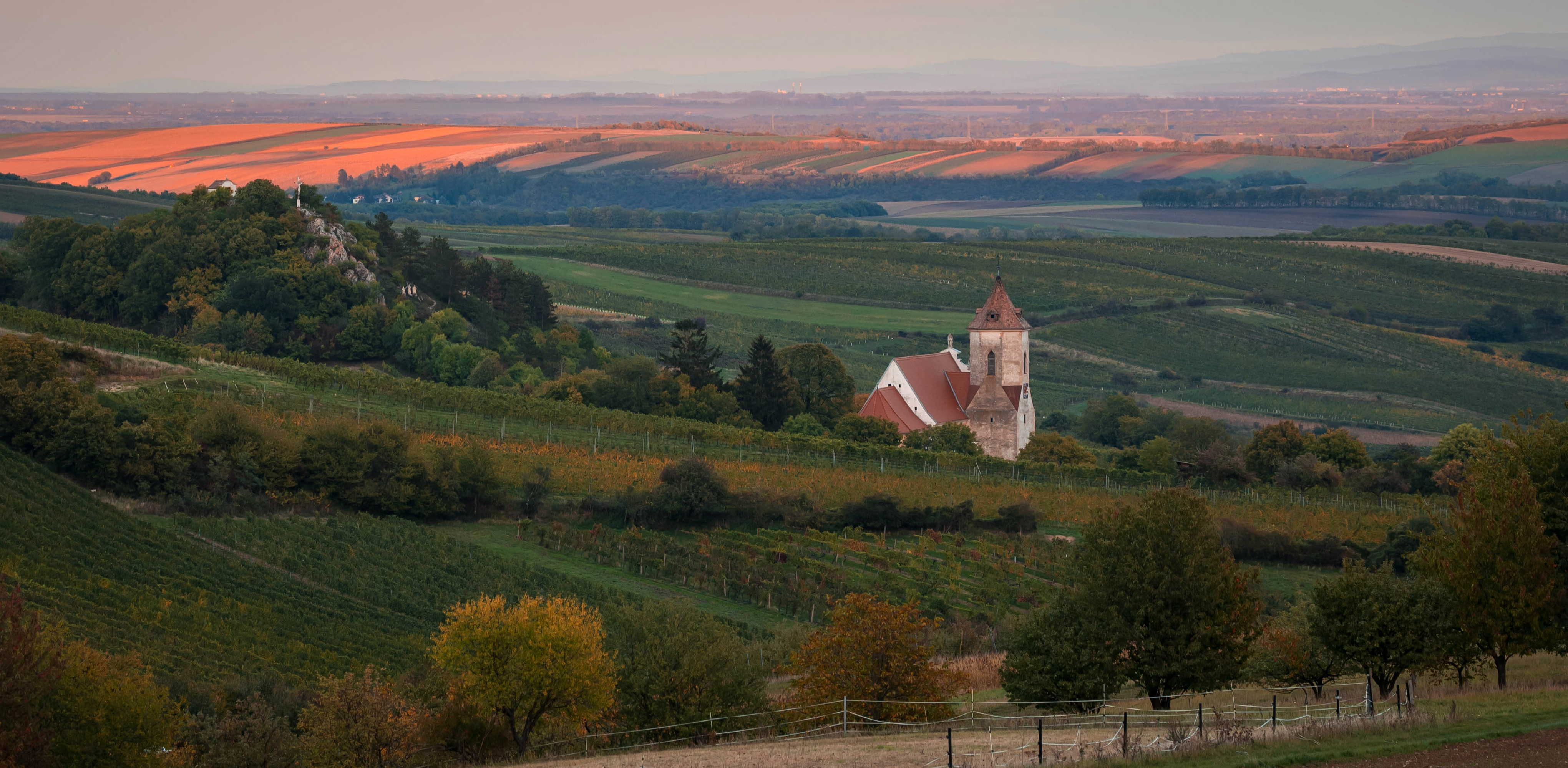 Kath. Pfarrkirche hl. Jakobus d. Ä.